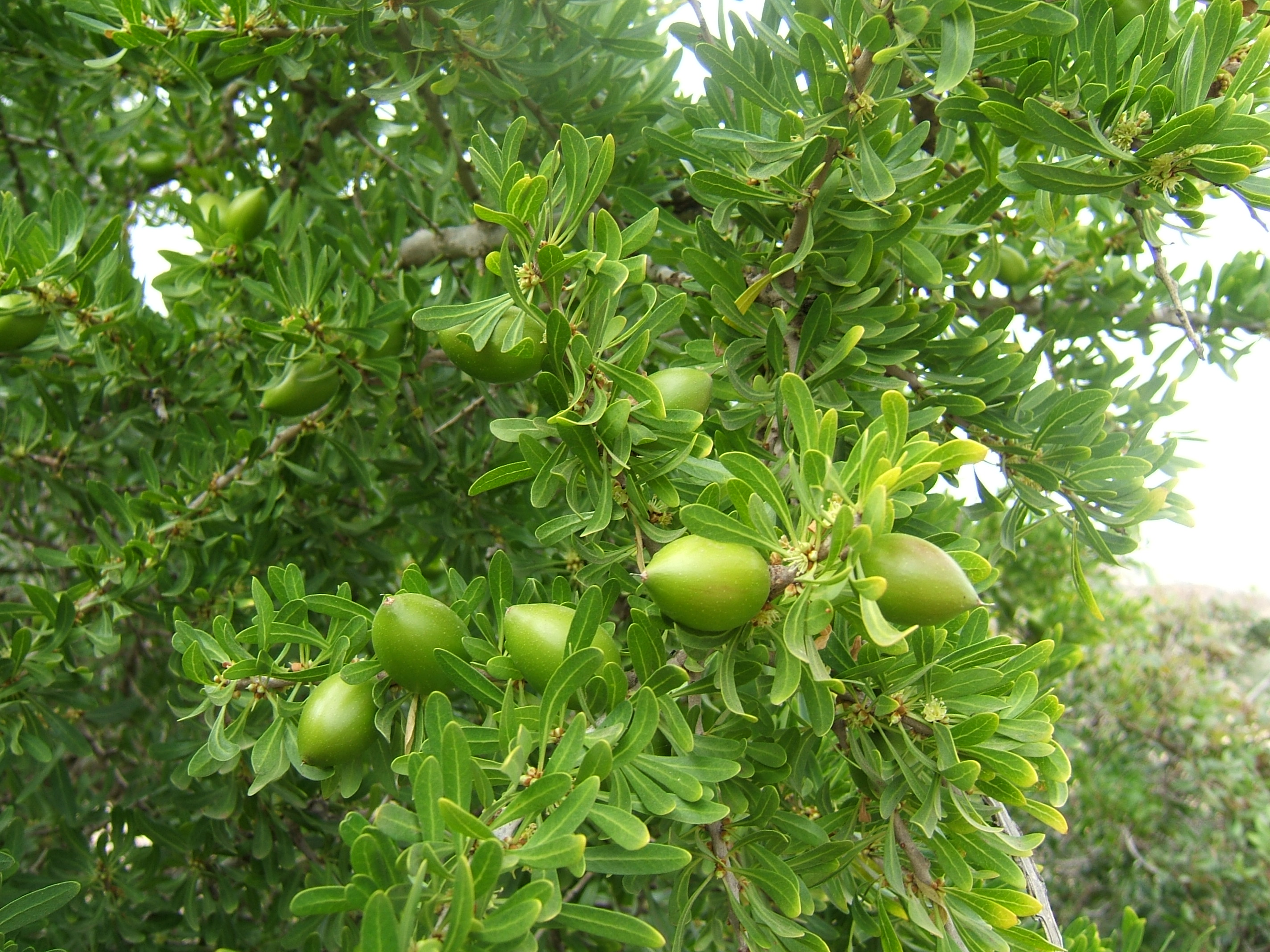 Argania spinosa, near Agadir, Maroc